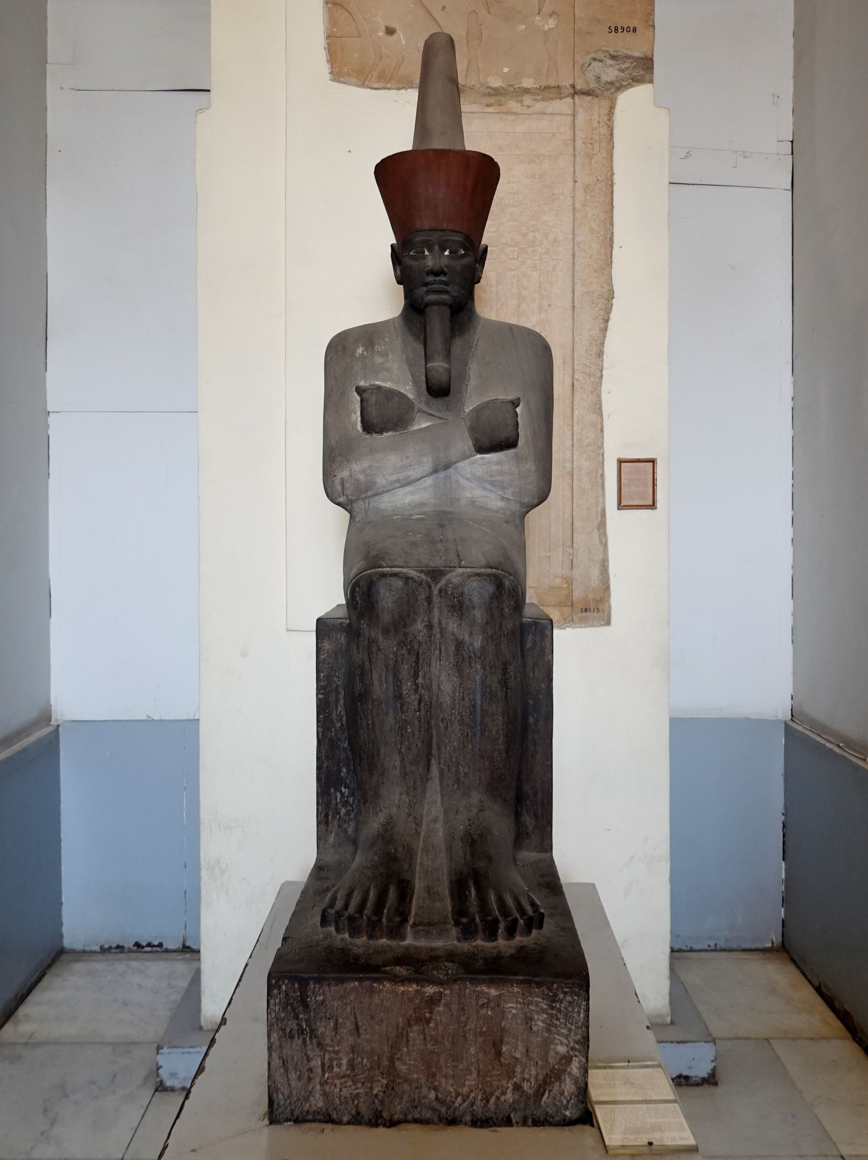 Sitzstatue des Königs Mentuhotep II. der 11. altägyptischen Dynastie, ausgestellt im Ägyptischen Museum in Kairo, Ägypten